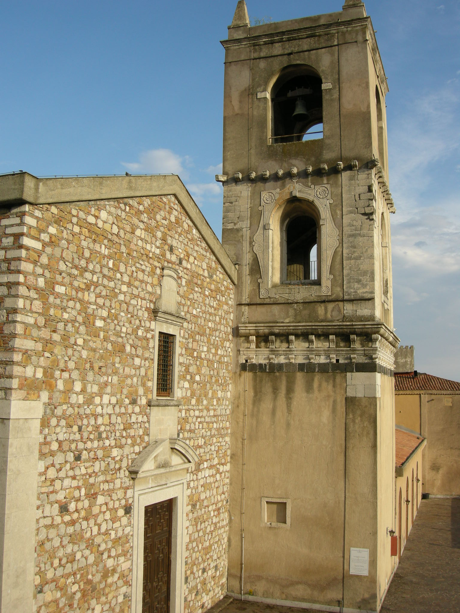 Facciata e campanile della ex chiesa (oggi sala conferenze) di San Domenico a Taormina.